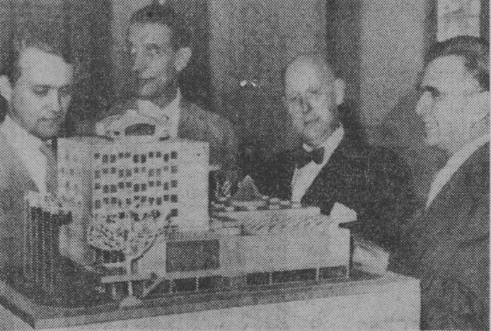 Arkitekt Hans Rehndal, direktör Kaj Dessau, museichefen dr Göran Axel-Nilsson och professor Helge Zimdal runt mofellen till det föreslagna Konstens Hus, Göteborg